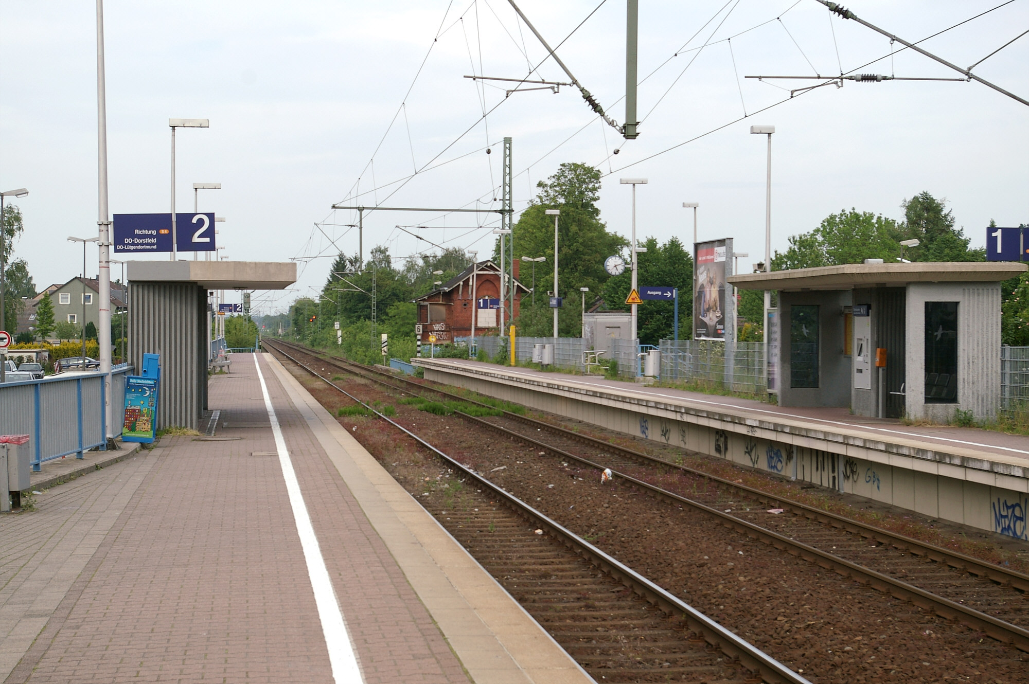 S-Bahnhof Dortmund-Wickede. Im Hintergrund das alte Schrankenwärterhäuschen